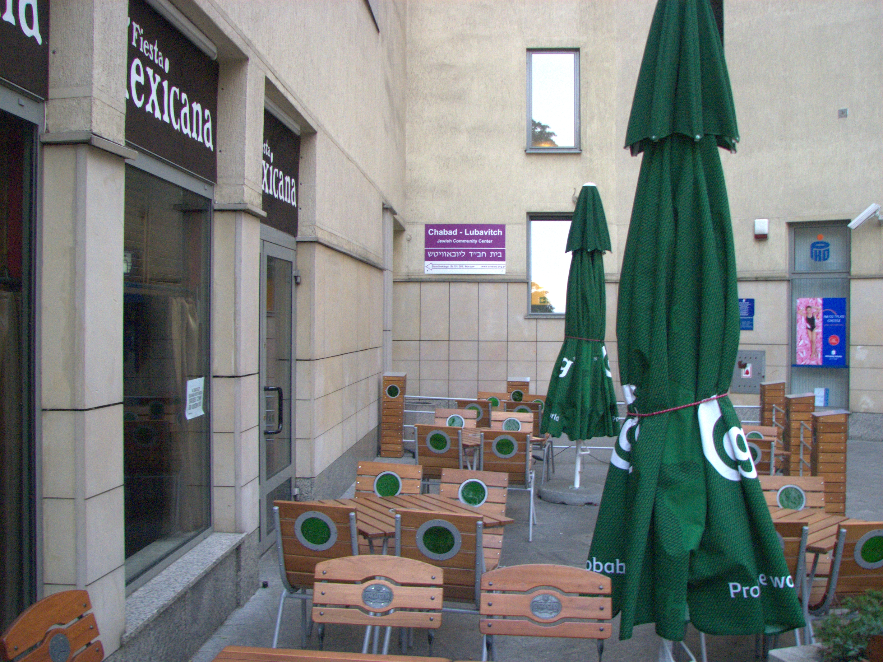 Wejście do budynku w którym znajduje się synagoga i restauracja koszerna.